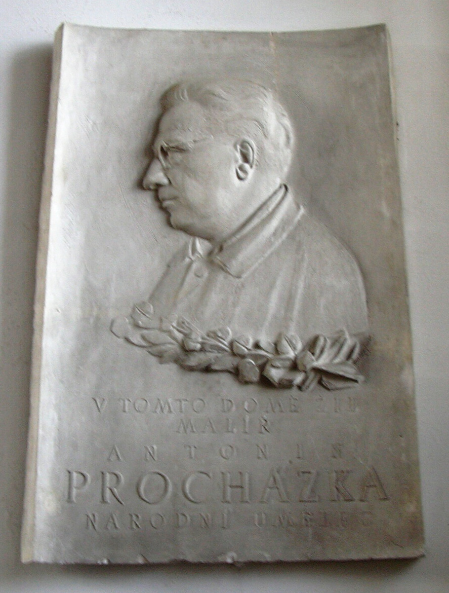 Antonín Procházka Malíř, Vyškov, Česká republika